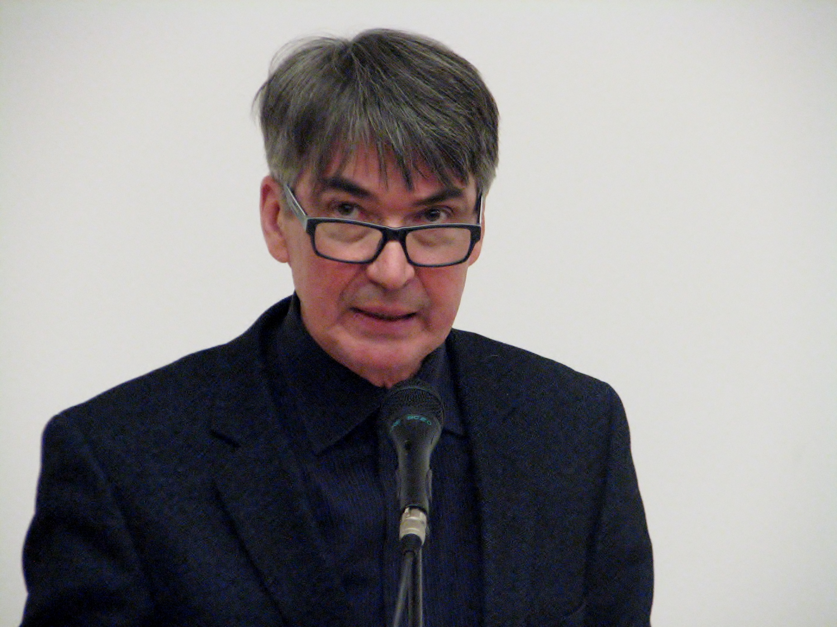 Ülar Ploom esinemas Tallinna Ülikoolis toimunud konverentsil "Eesti humanitaarne tulevik"